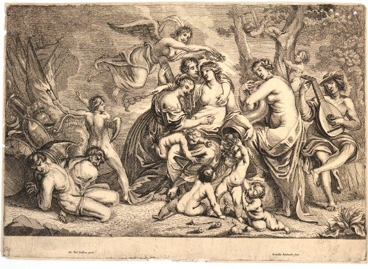 The Peace and the Blissfulness of the State; allegorical scene with Pax naked at centre, crowned by Victory and embraced by Force and Justice, Abundance and Mercury at right, War and two chained figures at left, putti carrying fruits in foreground; soiled plate-edges; after Peter Paul Rubens Etching